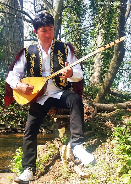 Orhan Temur Music Folklore Kulture